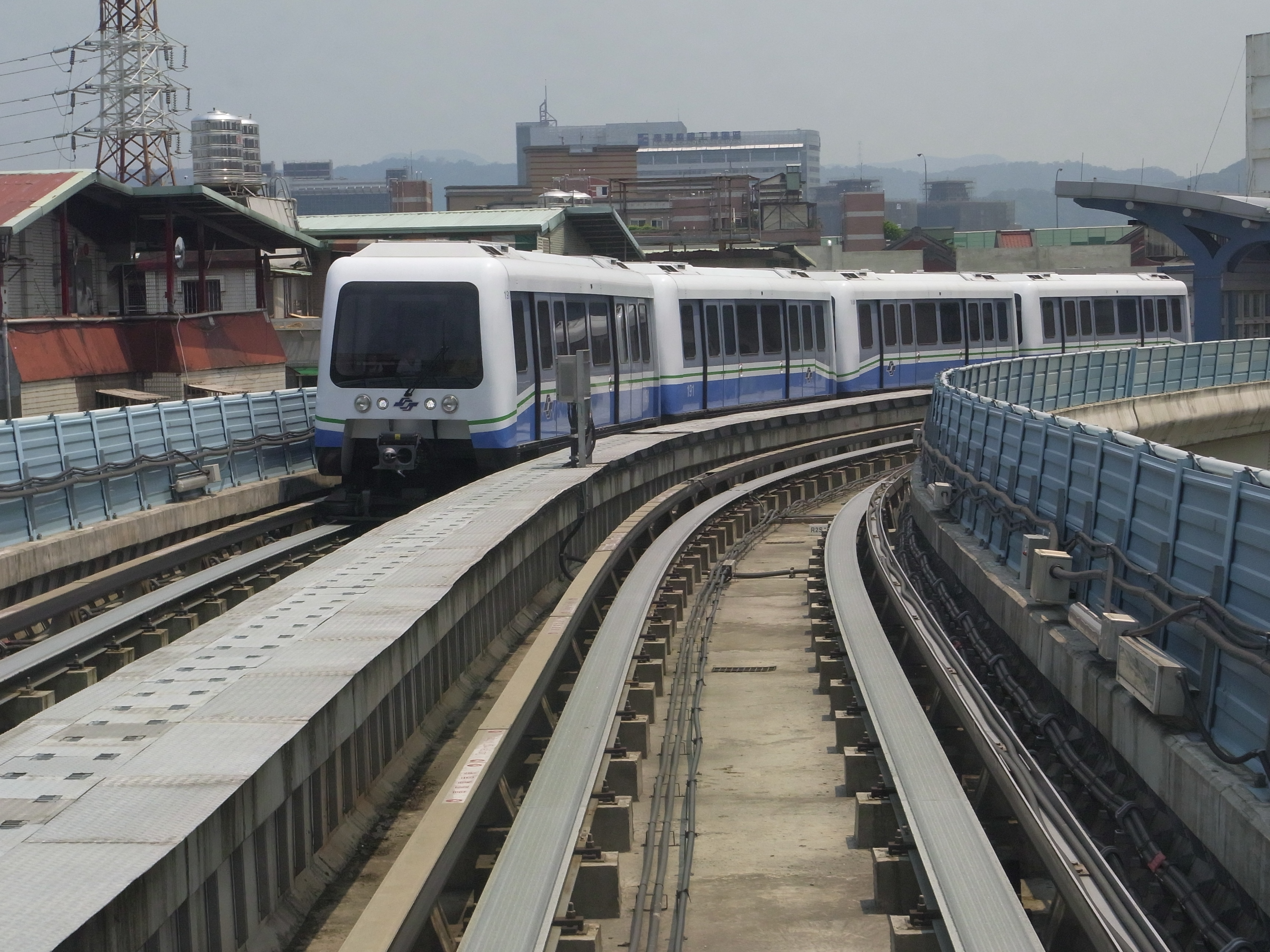 台北捷運內湖線CITYFLO650型龐巴迪列車 Bân-lâm-gú: Tâi-pak Tsiat-ūn Lāi-ôo-suànn CITYFLO650-hîng Phâng-pa-tik (Bombardier) liat-tshia. 臺北捷運內湖線CITYFLO650型龐巴迪(Bombardier)列車。